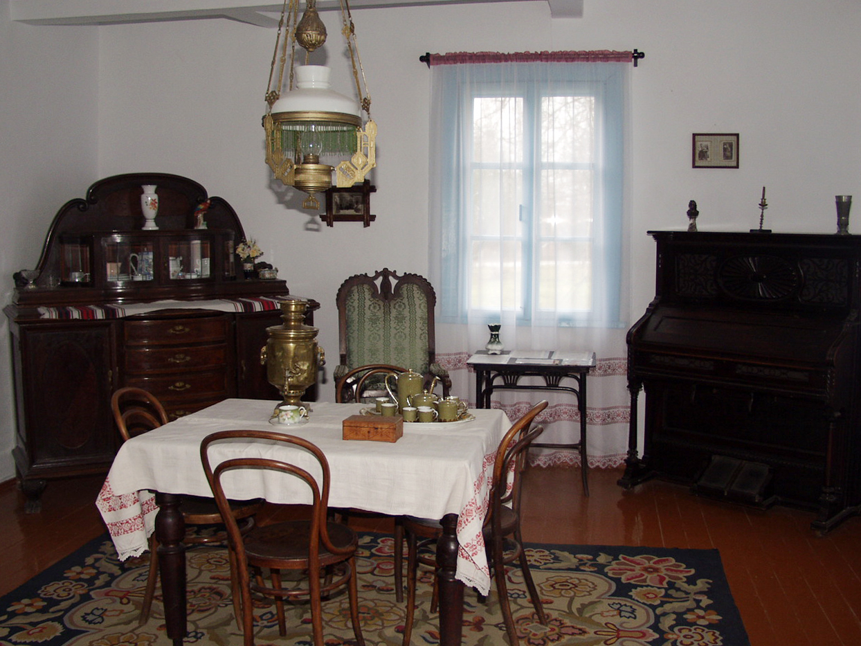 Музей Лесі Українки в селі Колодяжне, фото Анатолія РАРОГИ